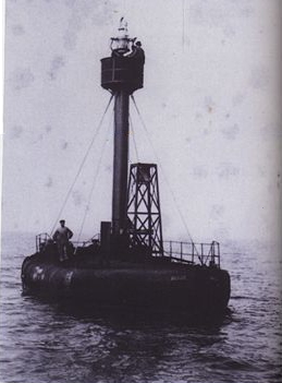 le Bateau Feu qui a entrainé la perte de l'Afrique